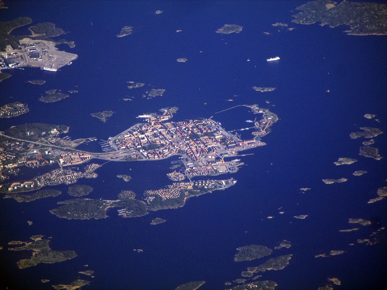 Stadt Karlskrona, Schweden